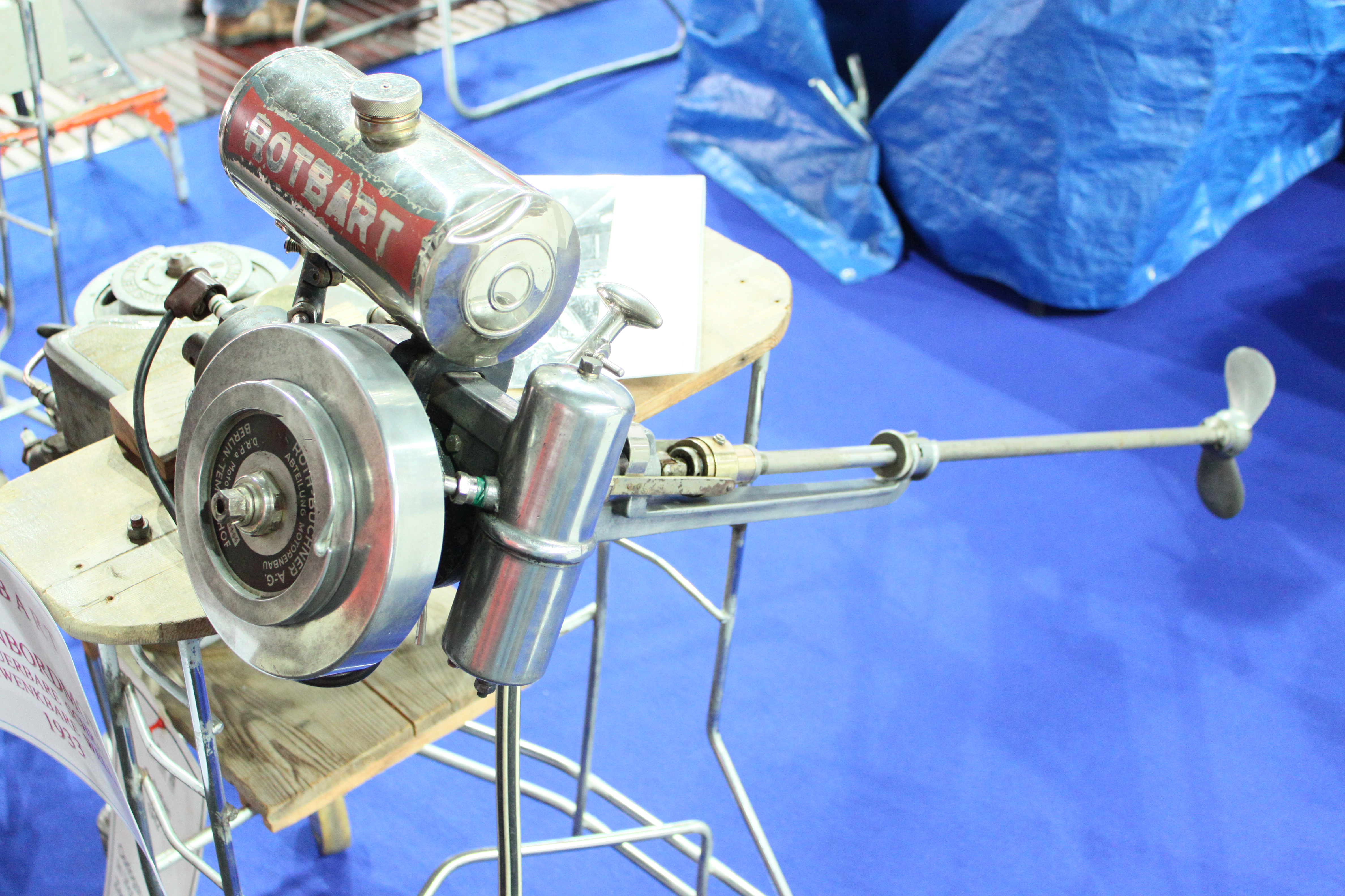 Außenbordmotor , gesehen auf der Messe Bremen "Boot 2011"